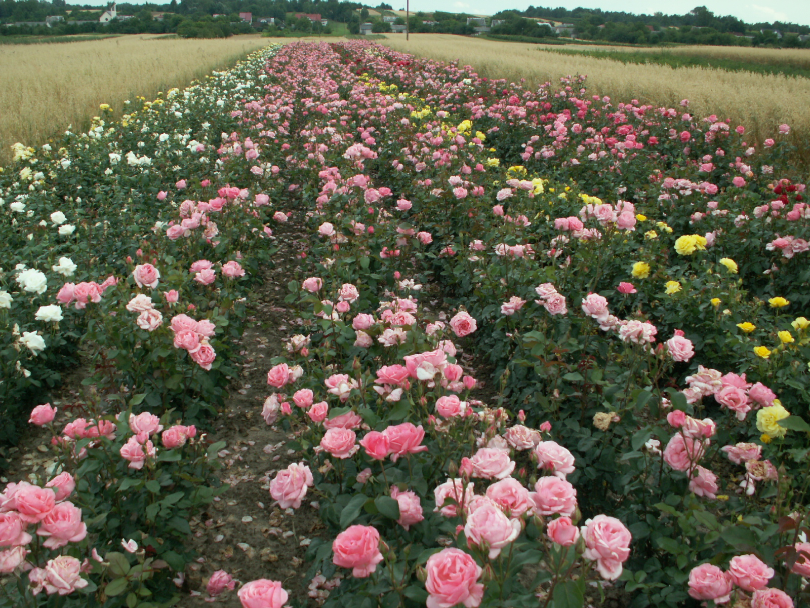 Plantacja róż w Skowieszynie